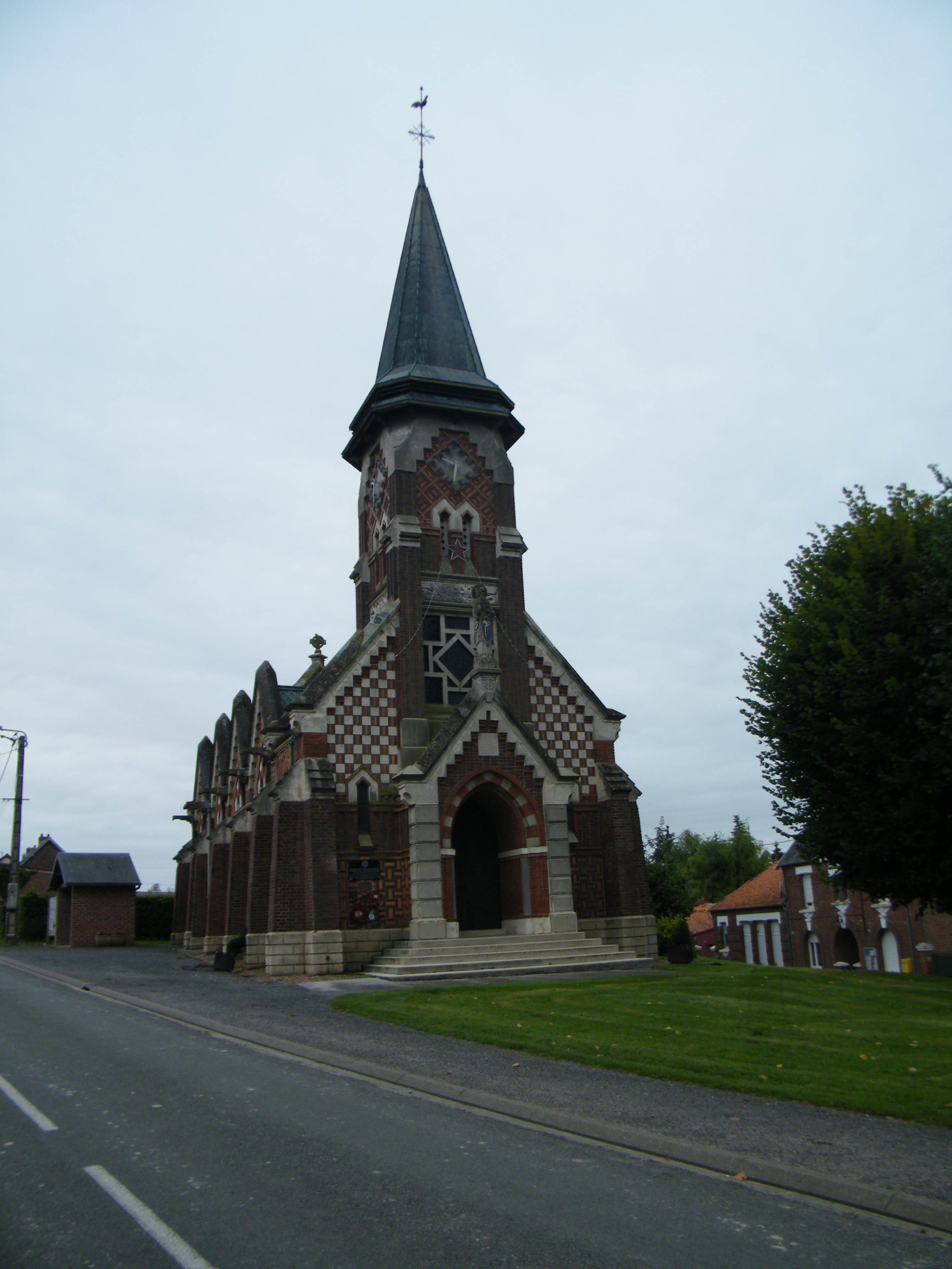 L'église Saint-Fursy d'Authuille.